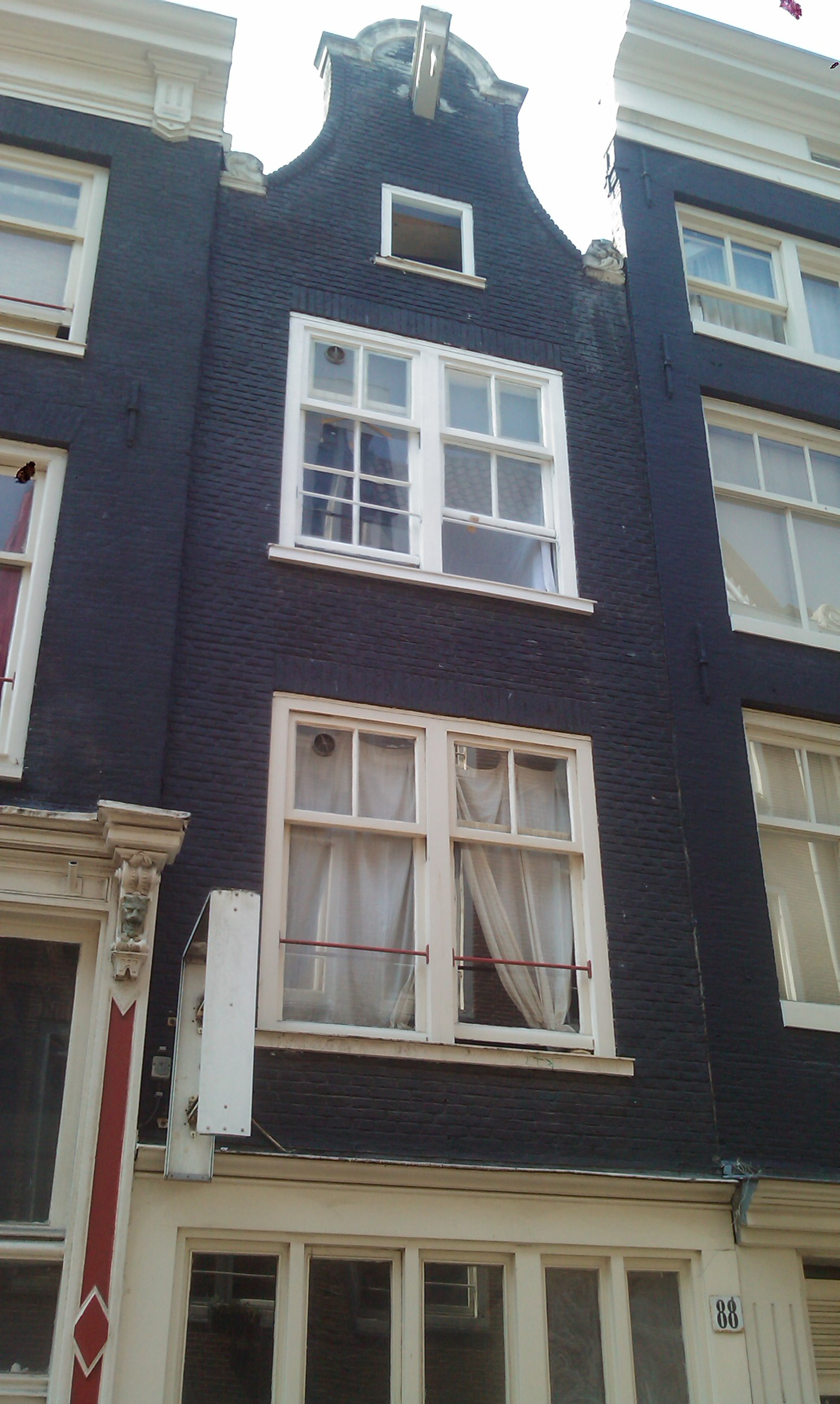 Huis, vanwege de 18e-eeuwse aanzetkrullen en afdekking van de klokvormige geveltop